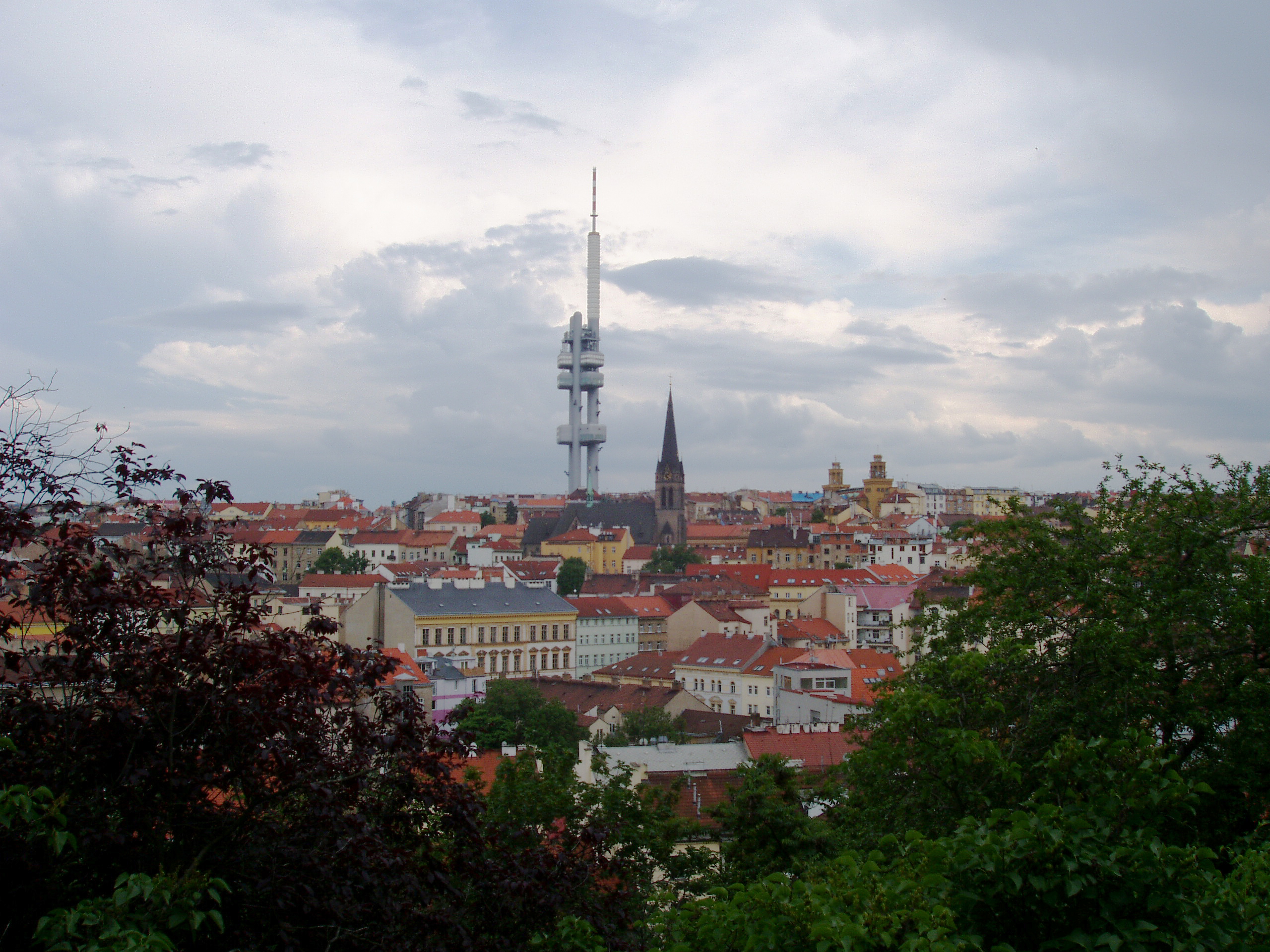 Žižkov, as seen from Vítkov hill